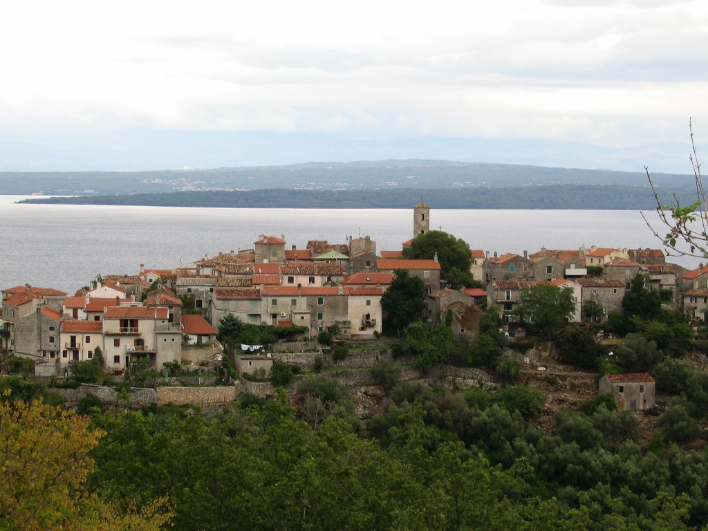 Blick auf Beli. Im Hintergrund sieht man die Insel Krk. Quelle: selbst fotografiert, September 2004 Fotograf: Punxsutawney-phil Lizenzstatus: GNU-FDL